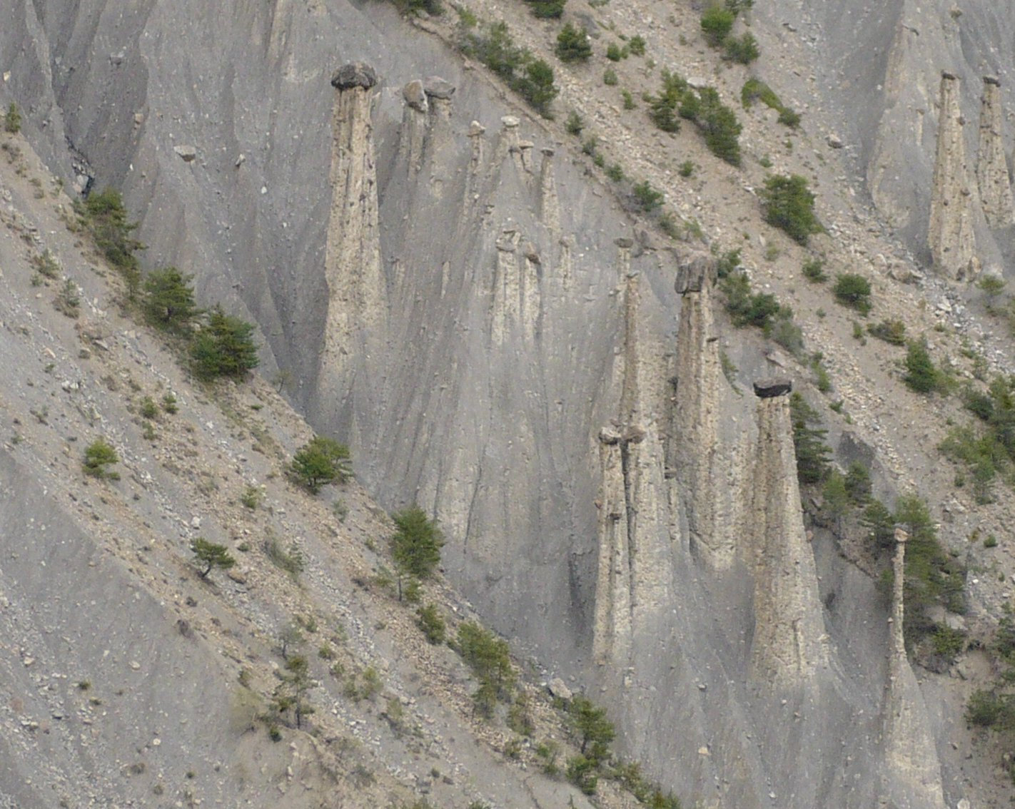 Cheminées de fées proche d'embrum, Hautes Alpes, cascade de la pisse